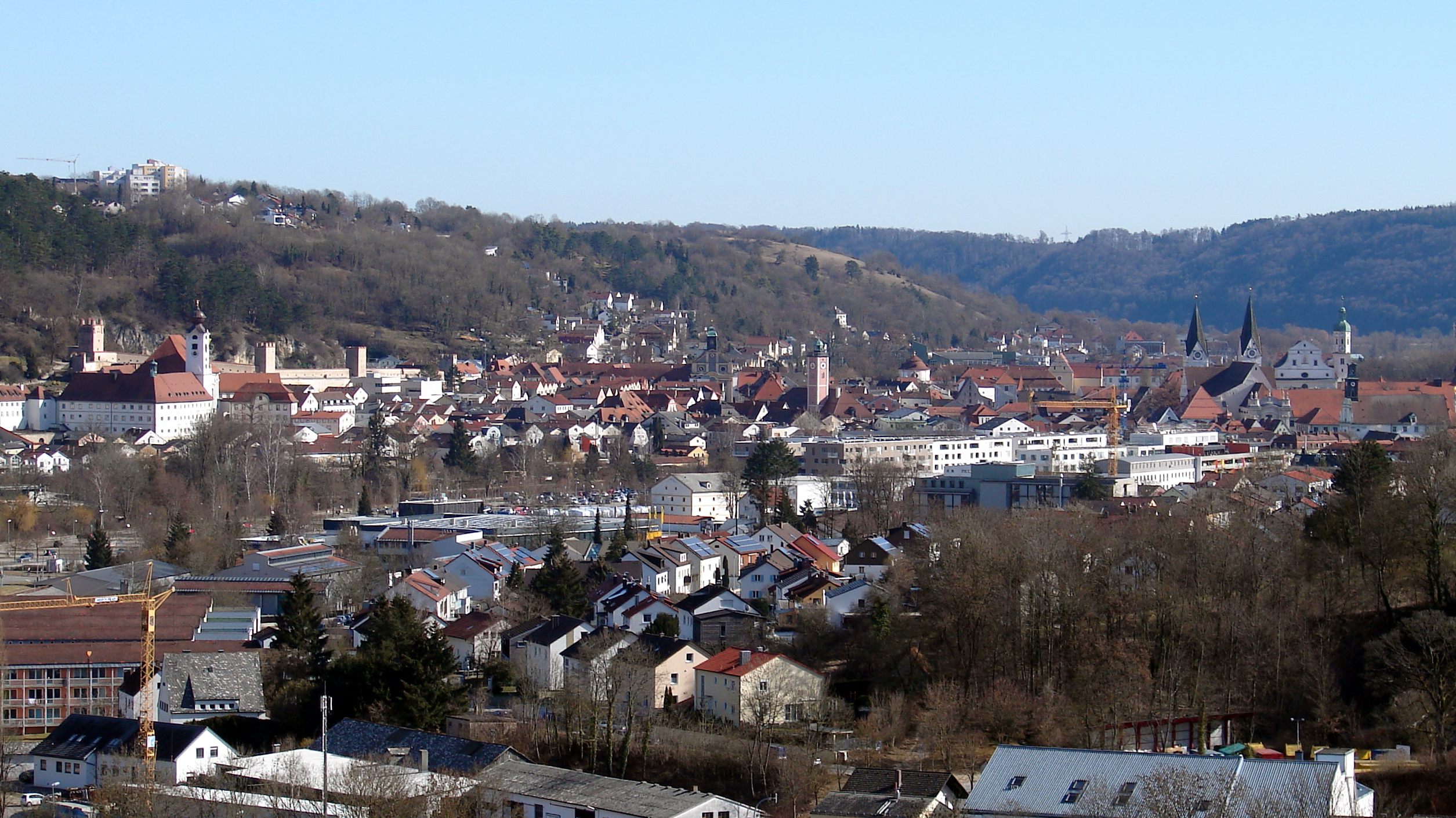 Blick von der B13 "Schönblick" auf Eichstätt.